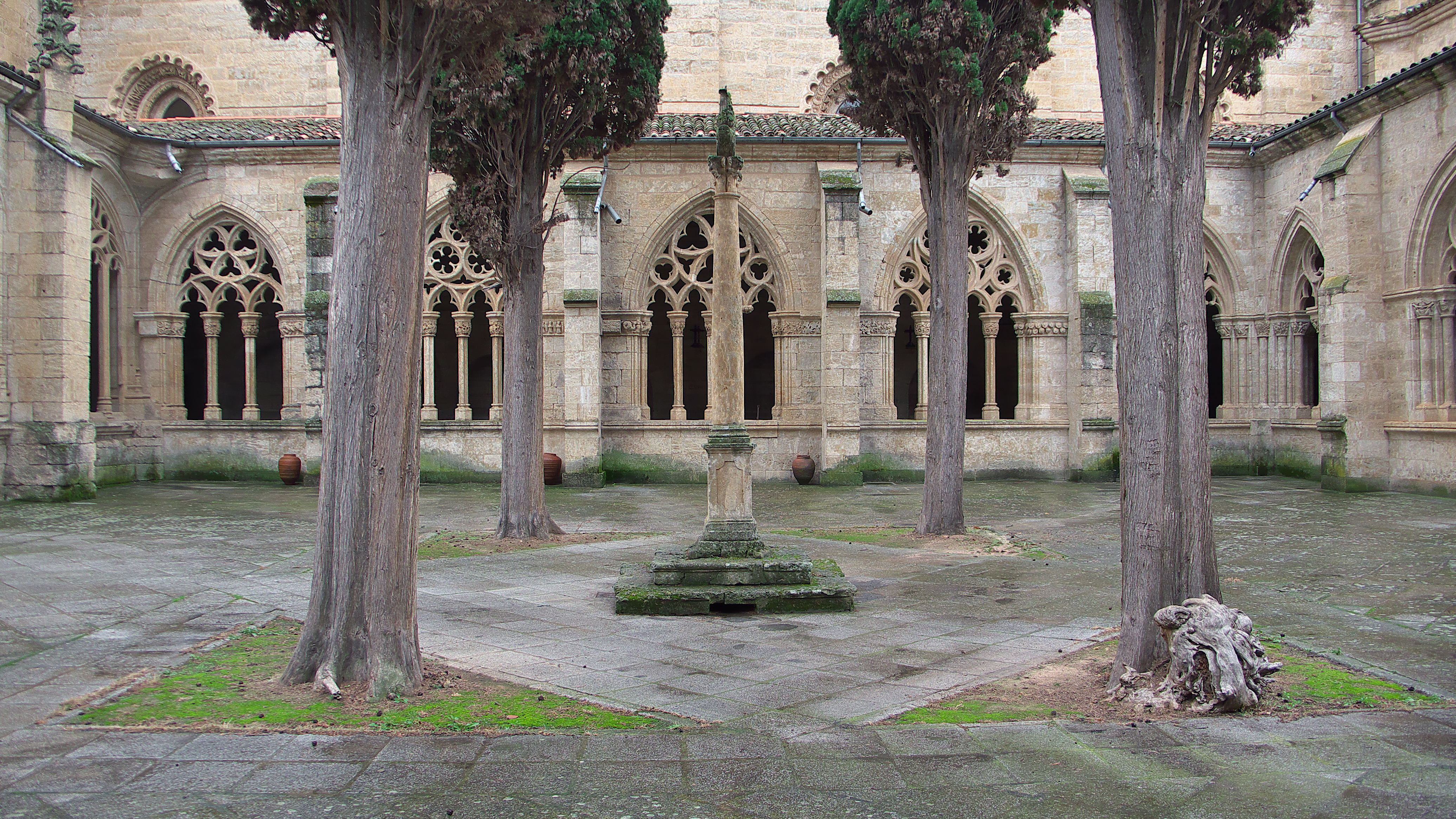 Panda meridional (s. XIV) del maestro Benito Sanchez